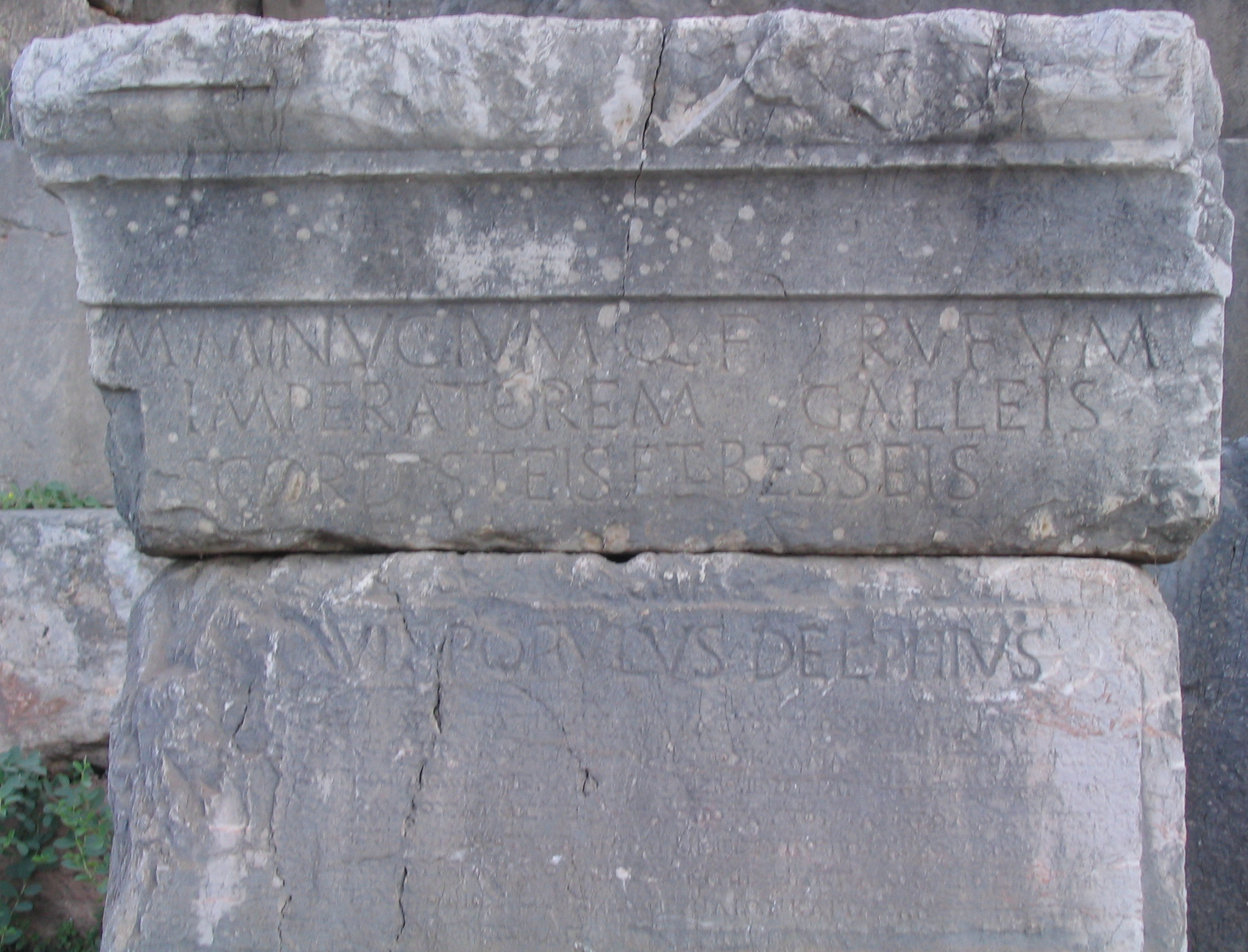 Inscription bilingue (latine et grecque) du IIème siècle avant J.-C. retrouvée et conservée à Delphes (Grèce). Il s’agit d’une base de calcaire, brisée en deux parties, destinée à une statue d’Apollon élevée en l’honneur de Marcus Minucius Rufus, consul en -110 et proconsul en Macédoine en -106 à la suite de ses victoires contre les barbares. Le texte latin se lisait : « M(arcum) Minucium Q(uinti) f(ilium) Rufum / imperatorem Galleis / Scordisteis et Besseis / [reliqueisque Thraecibus deuictei]s [ob me]rita [Apollinei] / [dedic]auit populus Delphius. ». Texte grec en dessous en plus petit caractères. Référence : CIL I(2), 692 ; CIL III, 14203(23) ; ILS 8887 ; ILLRP, 337 ; Dittenberger, Syll(2), 710. Photographiée en 2005. Unknown